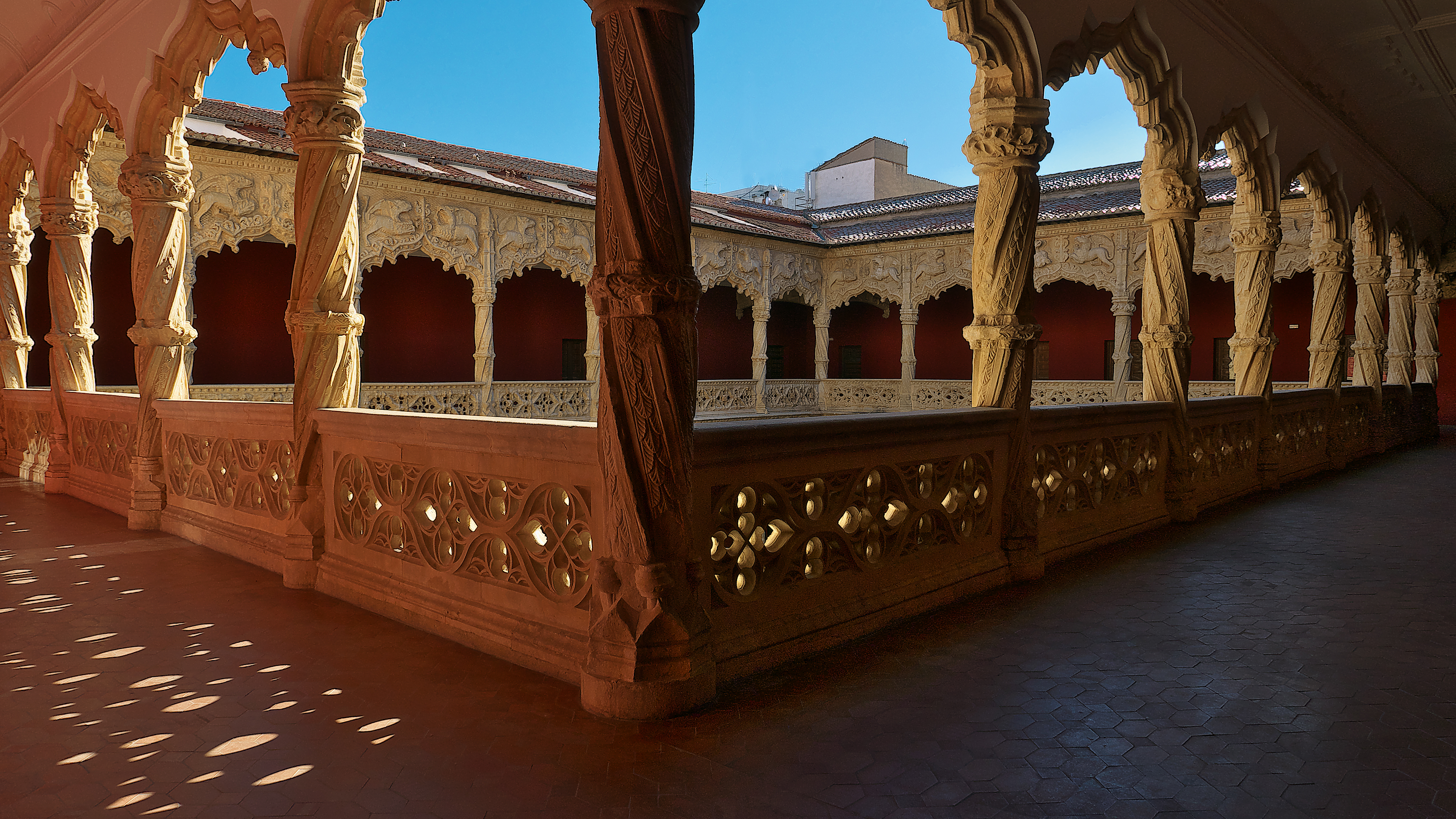 Palacio del Infantado, Guadalajara. Piso superior del patio